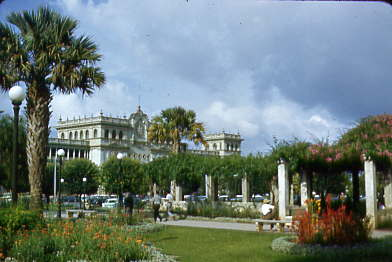 10 set 1956. Ciudad de Guatemala, Palacio de Gobierno